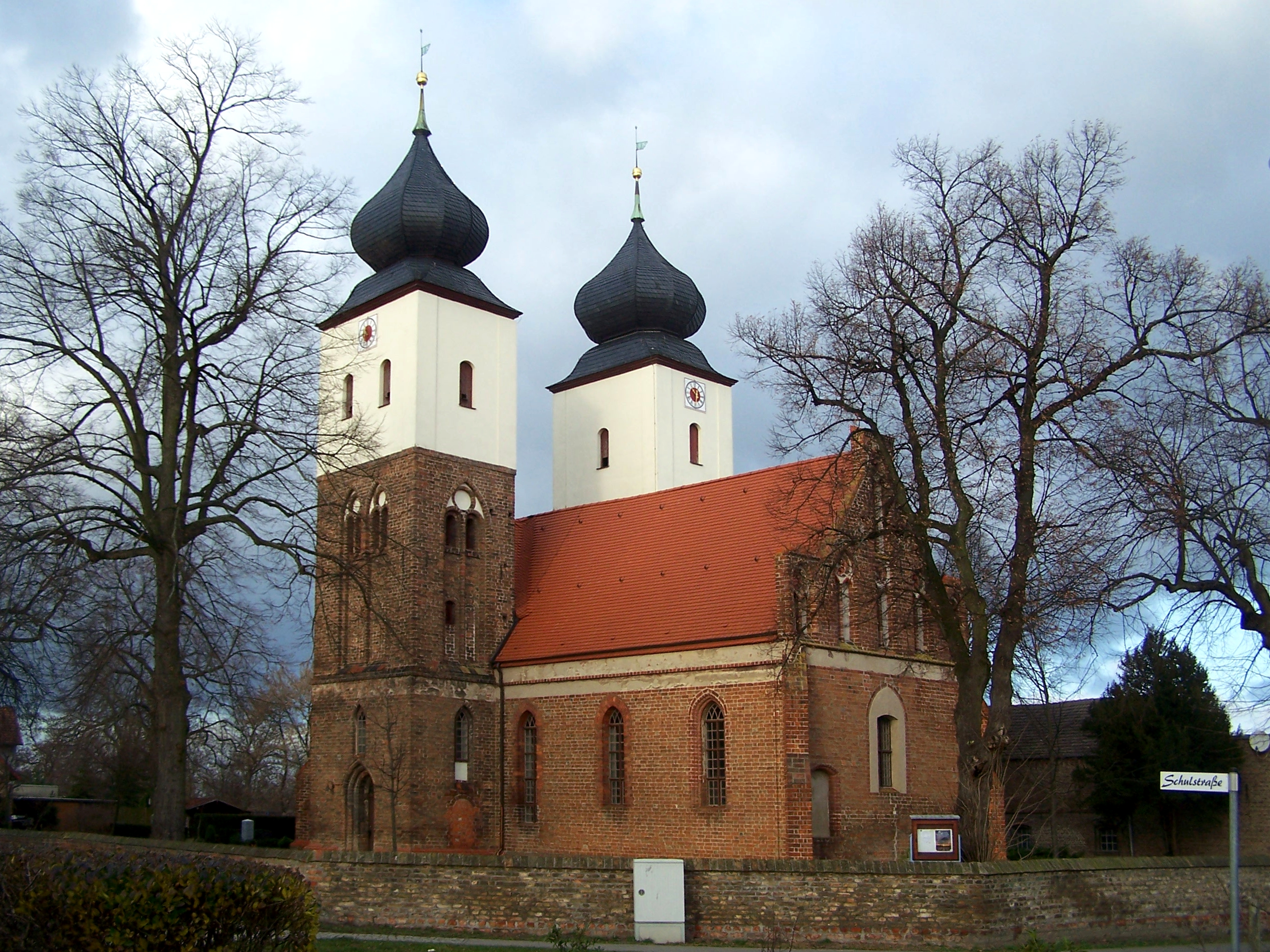 Kirche in Tremmen, einem Ortsteil von Ketzin, Landkreis Havelland